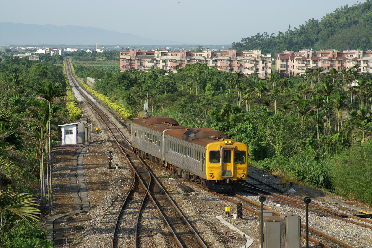 DR2700型柴油車行駛的臺東線區間車，也是普通車。